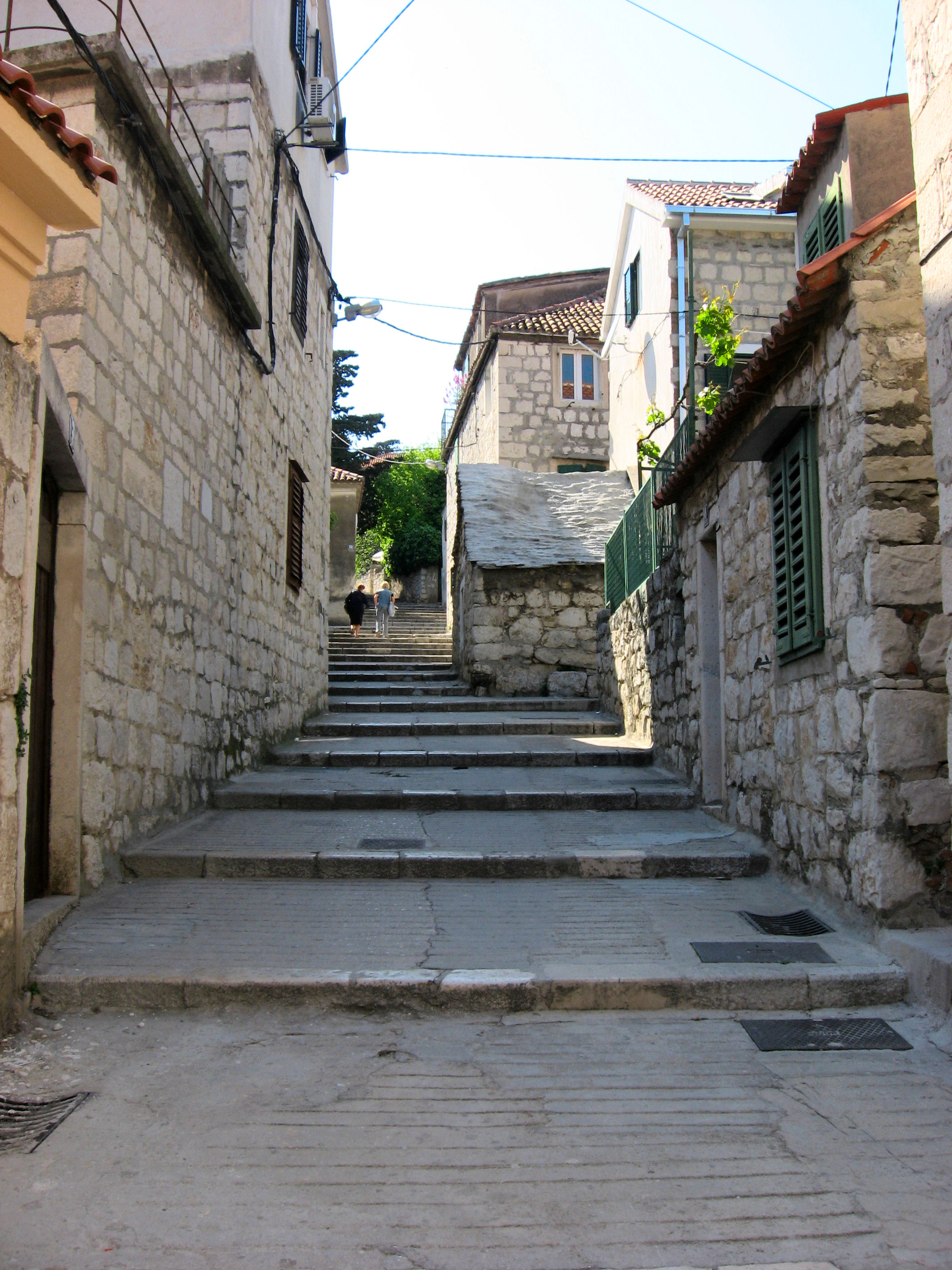 Varoške skaline